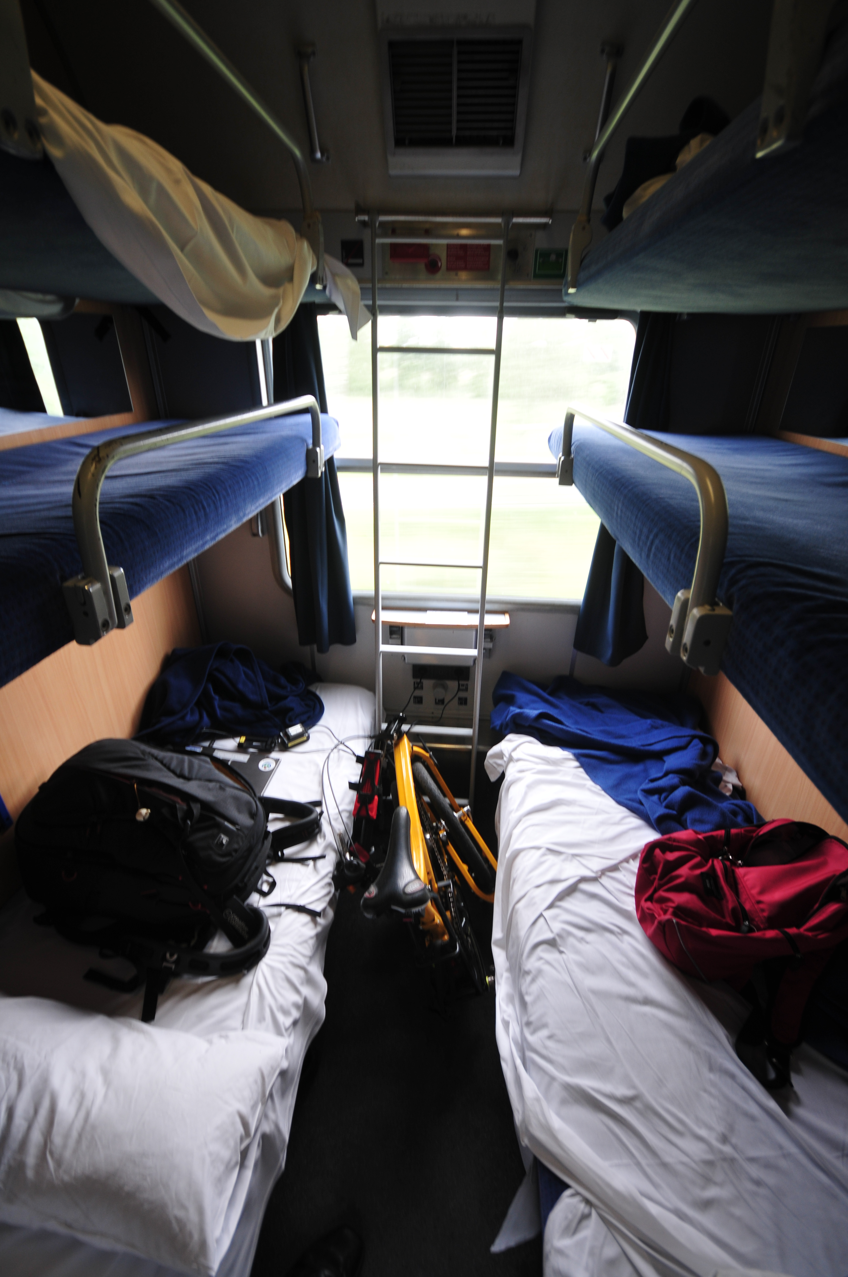 Birdy im Liegewagen